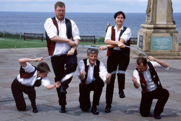 Jack the Rapper, ein Schwerttanzverein aus Norwegen, beim Aufführen des Rapper-Kettenschwerttanzes (siehe Rapper Sword) beim World Millennium Sword Spectacular im Mai 2000